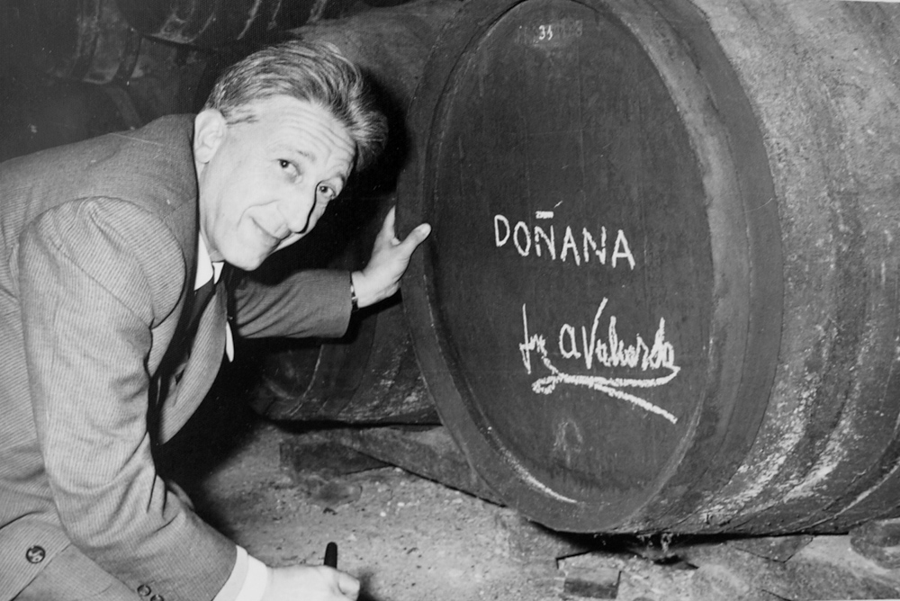 Fotografía de José Antonio Valverde.